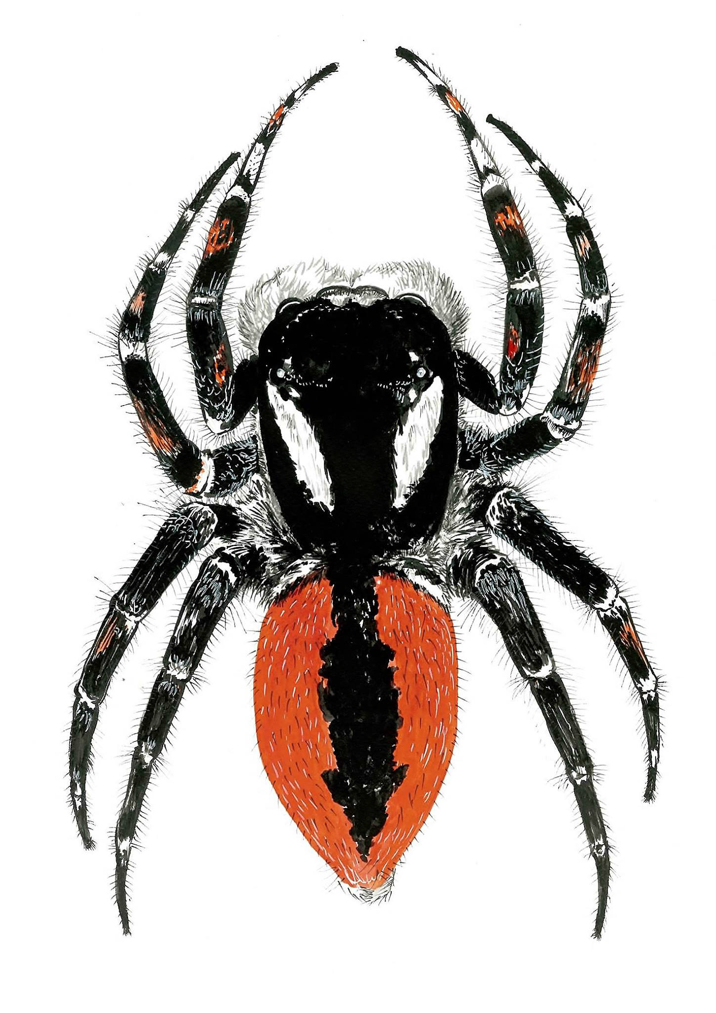 Philaeus jugatus (L. Koch, 1856) es un saltícido autóctono de la Península Ibérica. El ejemplar aquí representado es un macho observado en Chinchilla de Montearagón (Albacete, España) en el año 2012 y dibujado a partir de fotografías tomadas en el momento de la observación. El tamaño de esta especie alcanza los 12 mm de longitud, siendo los machos generalmente mayores que las hembras. La librea de los machos destaca más que la de las hembras, que suelen ser marrones con manchas grisáceas y blancas, mientras que los primeros poseen un cefalotórax negro con dos manchas blancas convergentes, el opistosoma es rojizo con una mancha negra longitudinal. Los pedipalpos están cubiertos de cerdas blancas conspicuas y presentan la forma típica de los saltícidos. Se alimentan de pequeños invertebrados que capturan en sus correrías diurnas. Esta especie habita en zonas cálidas y soleadas.